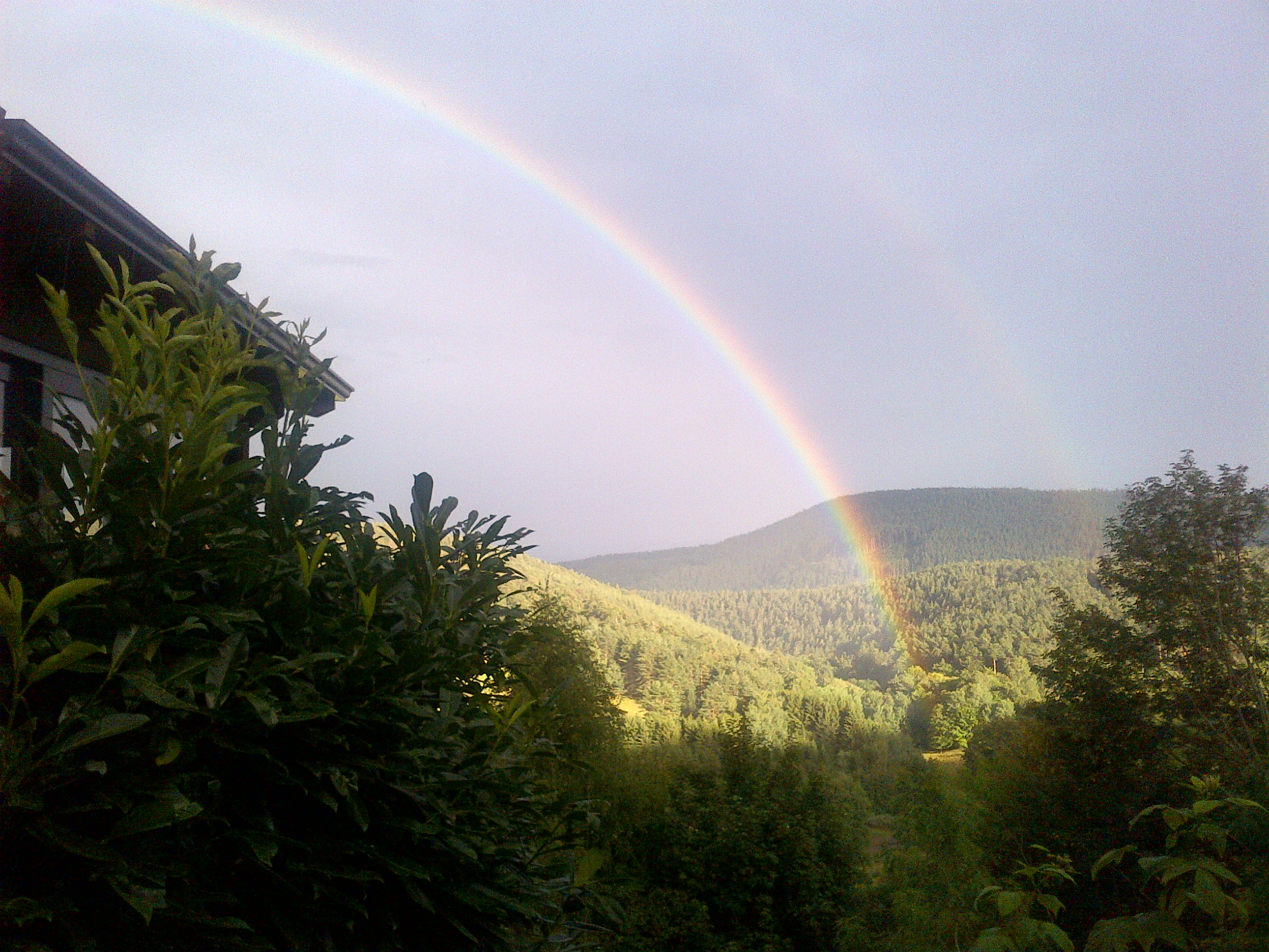 arc en ciel à Aubure 68150